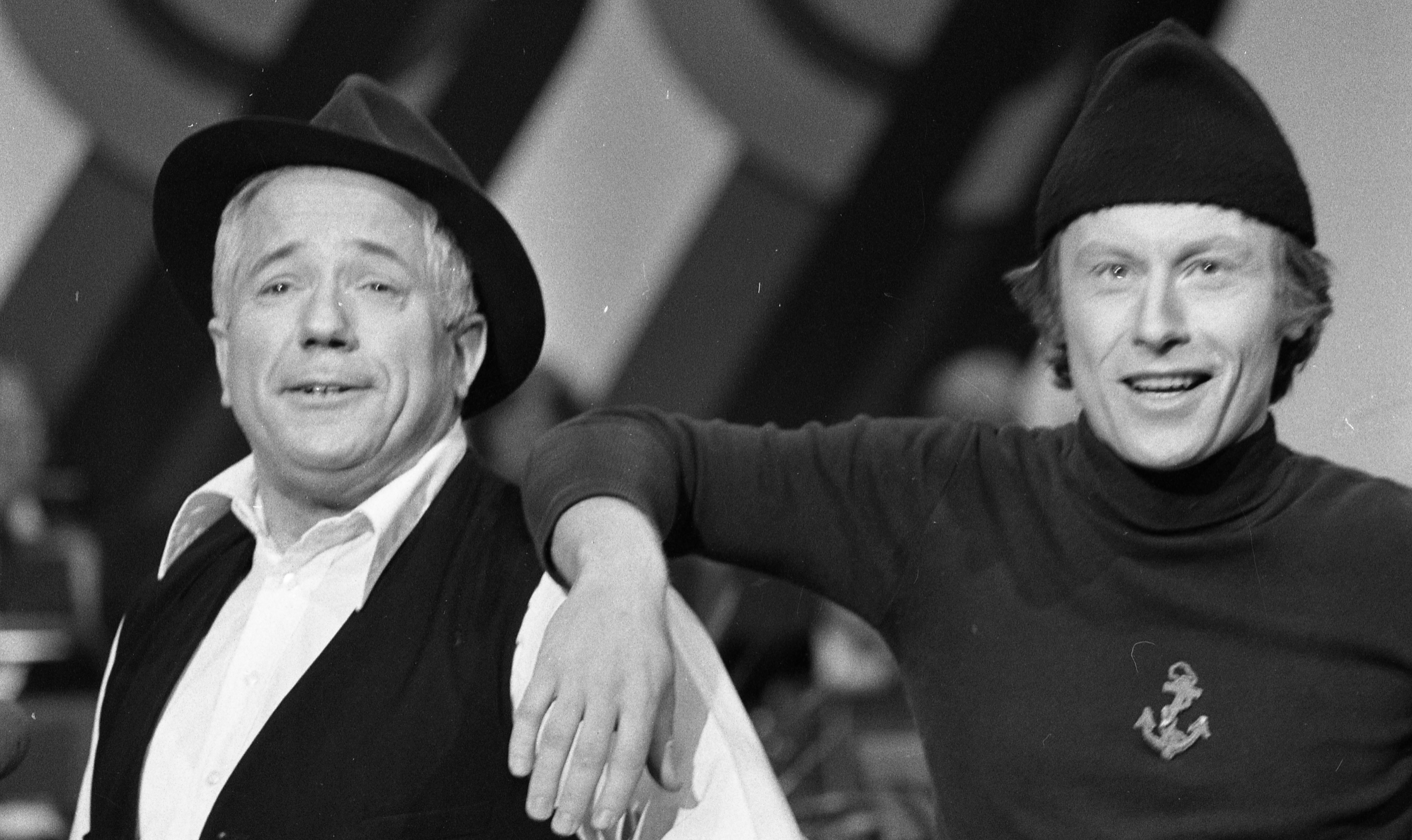 Spellemannsprisen 1980. Foto: Arne Nielsen. Arkivref: PA-0797_U_9888_002_018